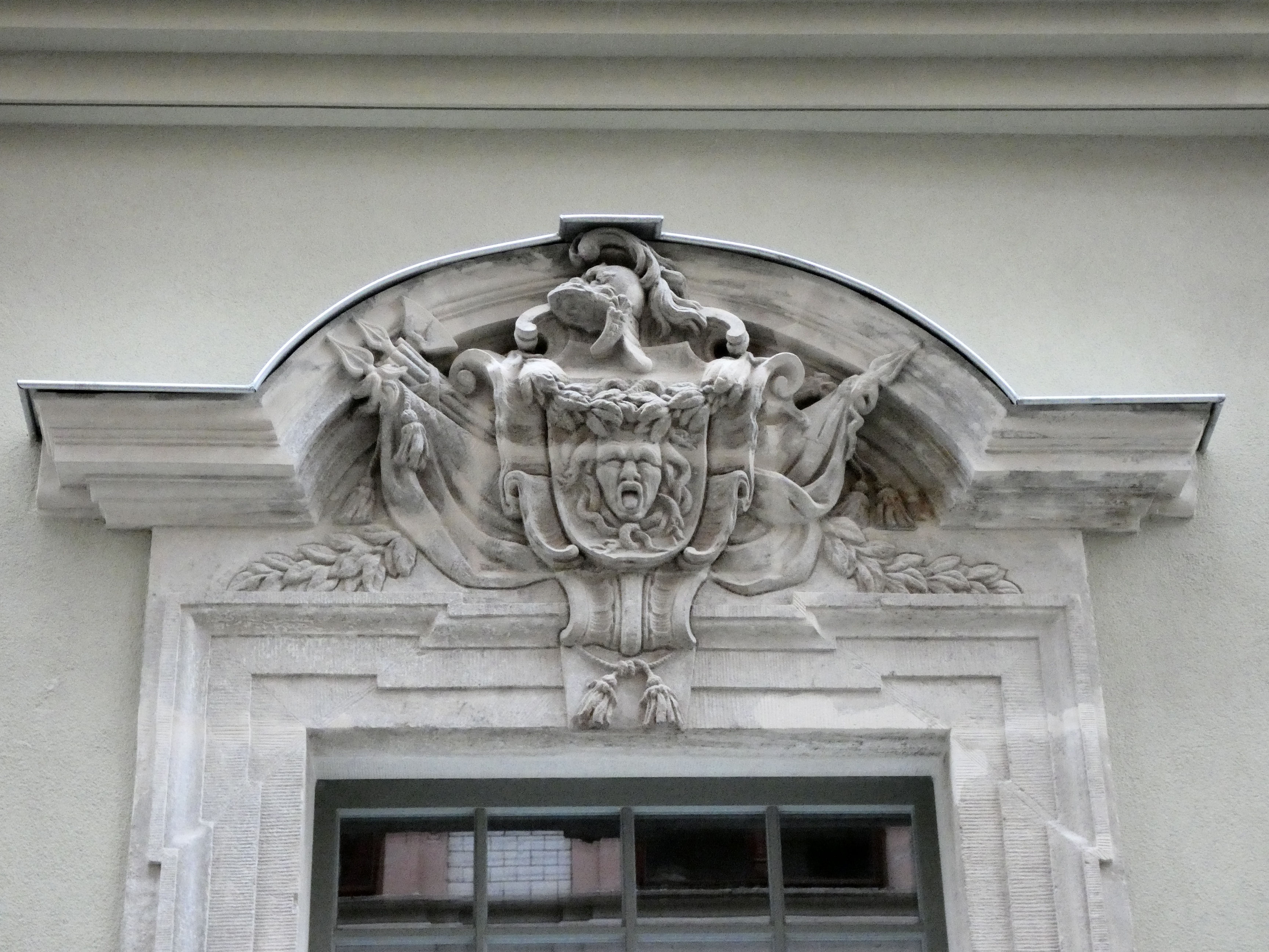 Spätbarockes Portal am Haus Jägergasse 1, Halle (Saale)